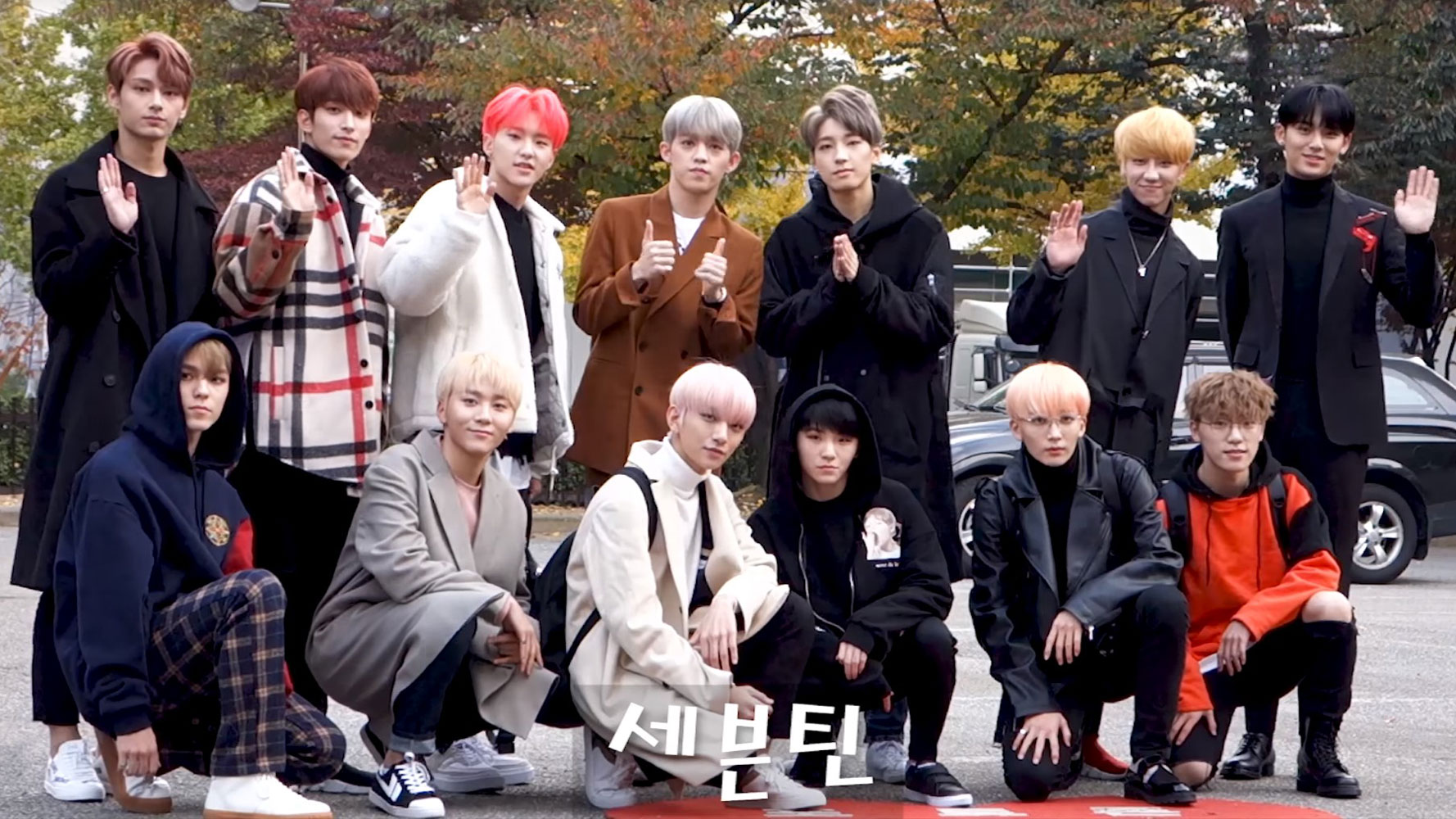 171110 KBS 뮤직뱅크 출근길